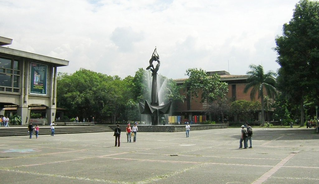 Plazuela Central, Universidad de Antioquia, Medellín, Colombia (esta foto la tome yo, y la libero al dominio público)